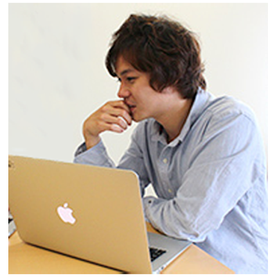 my profile